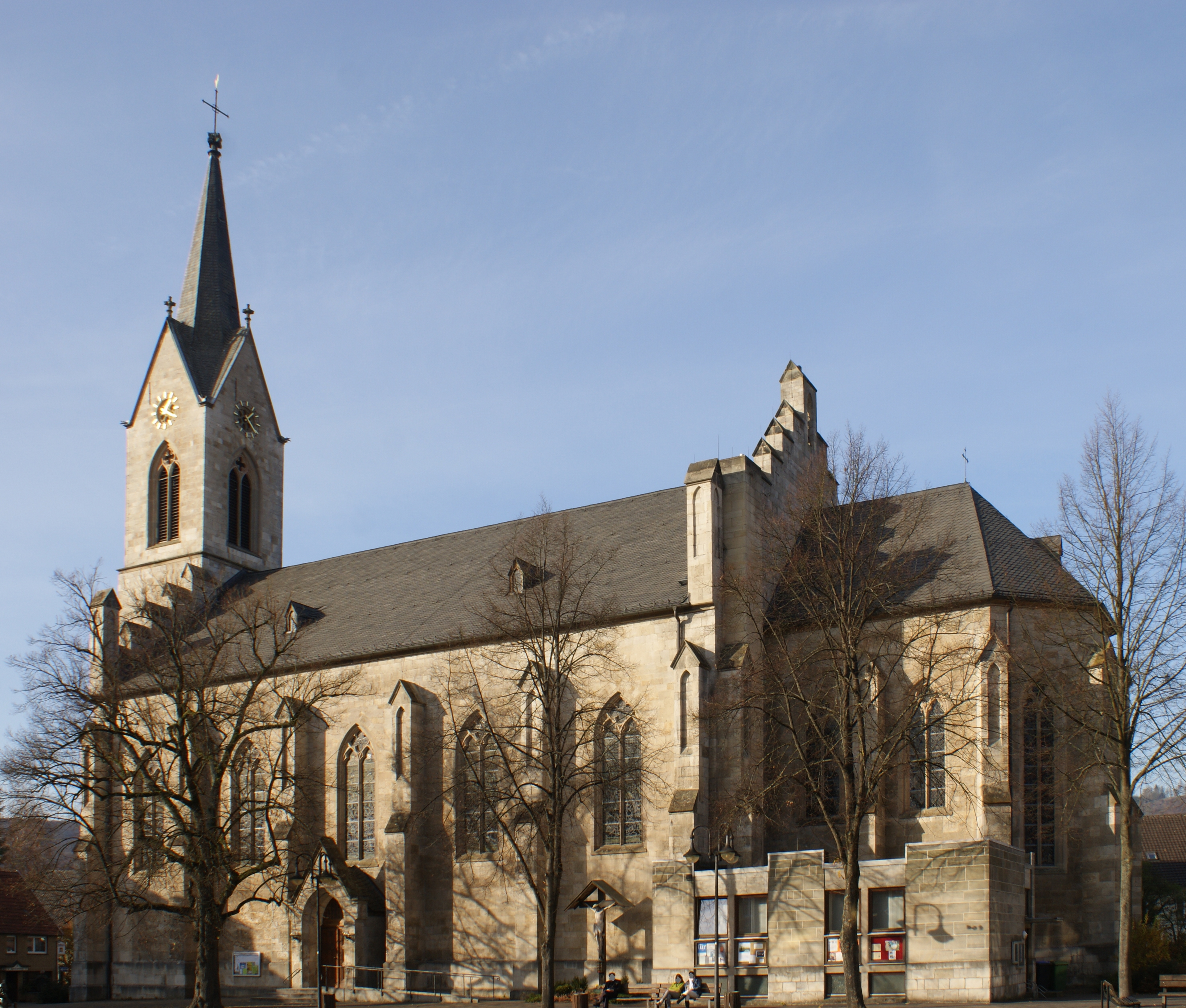 St Magnus Marsberg Denkmalnr A70 This is the photograph of an architectural monument. It is part of the list of cultural monuments of Dortmund, no. A 70